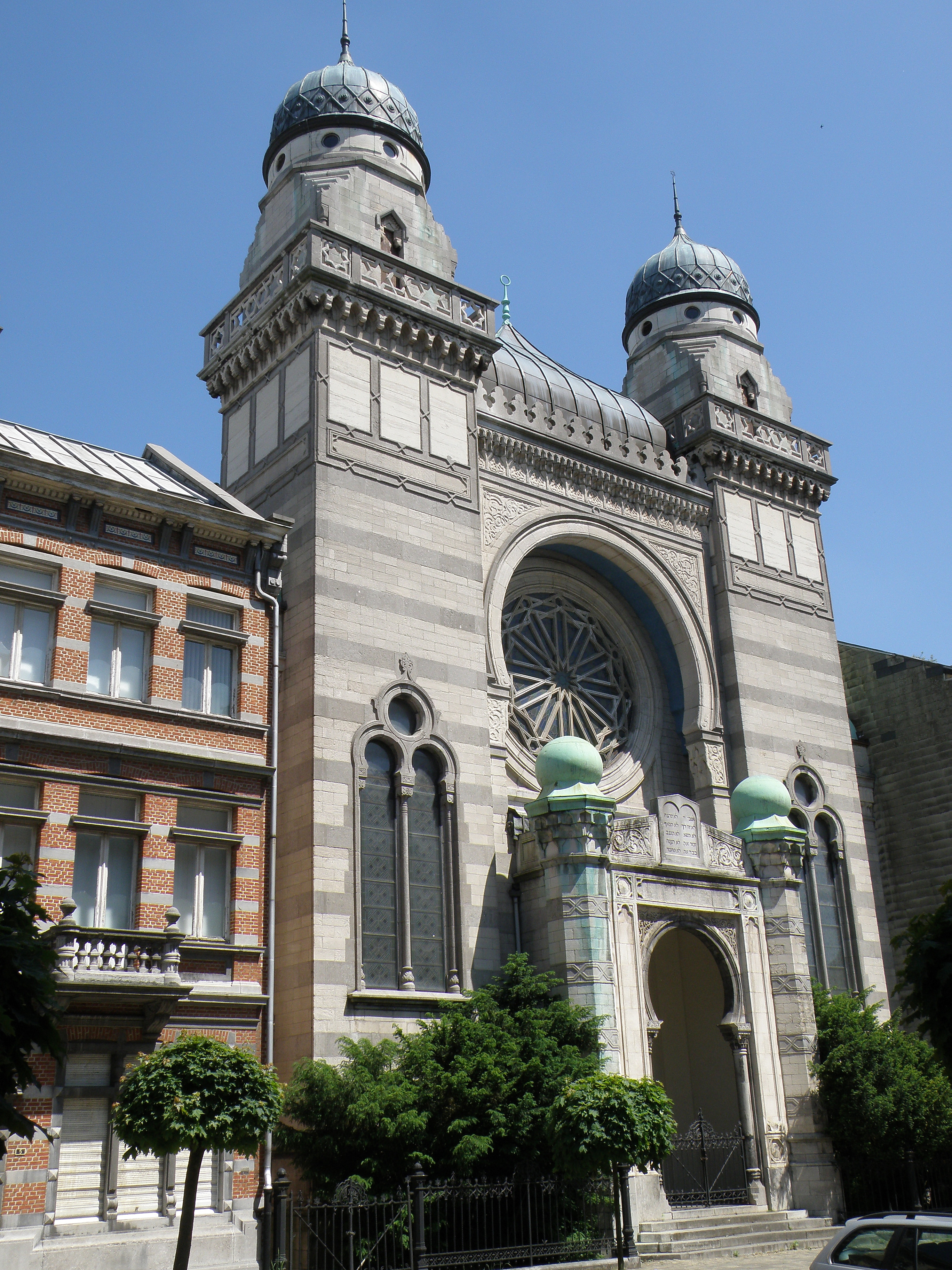 Anvers, Belgique. Synagogue, dite hollandaise, de style mauresque, sise Bouwmeestersstraat (ci-devant rue des Architectes). Oeuvre de Joseph Hertogs et Ernest Stordiau (1893).